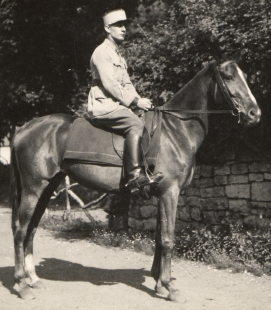 Jean Collot, jeune engagé au 11e Régiment de Chasseurs de Vesoul, pose sur son cheval